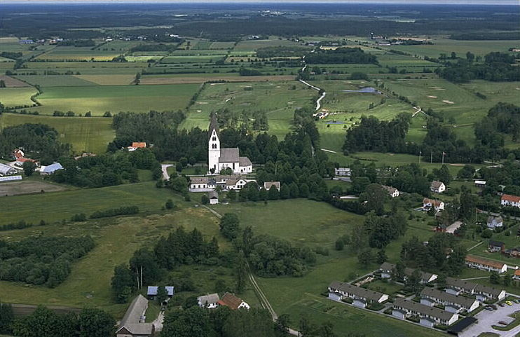 Motiv: Stånga kyrka Nyckelord: Flygbilder, Riksintressen Kategori: KyrkbyStånga kyrka